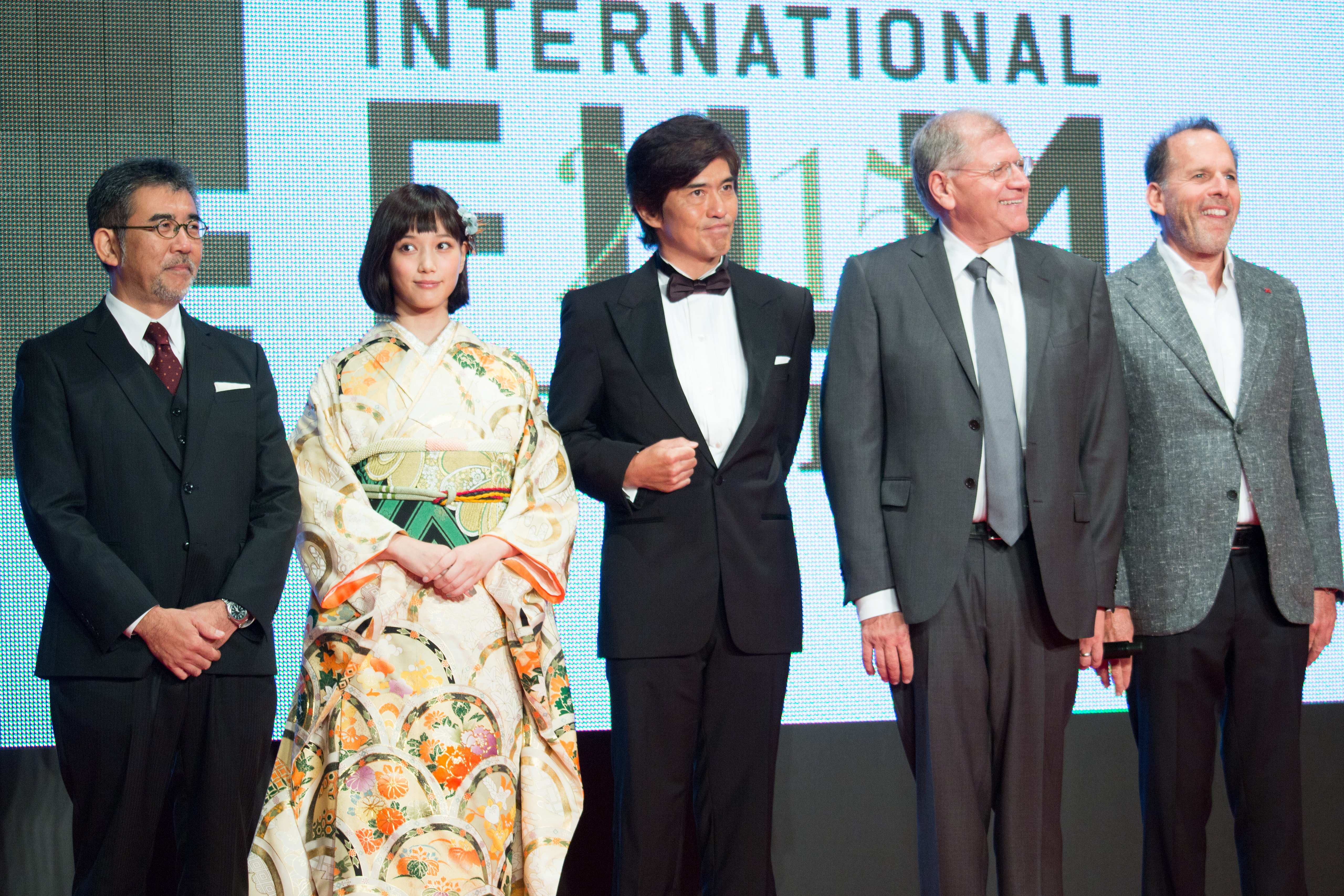 第28回 東京国際映画祭 オープニングセレモニー 篠原哲雄 佐藤浩市 本田翼 ロバート・ゼメキス ジャック・ラプケ